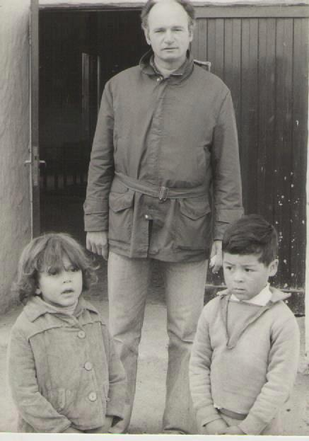 Raúl Vila, sacerdote católico, activista social de la localidad de Merlo, Buenos Aires, Argentina.